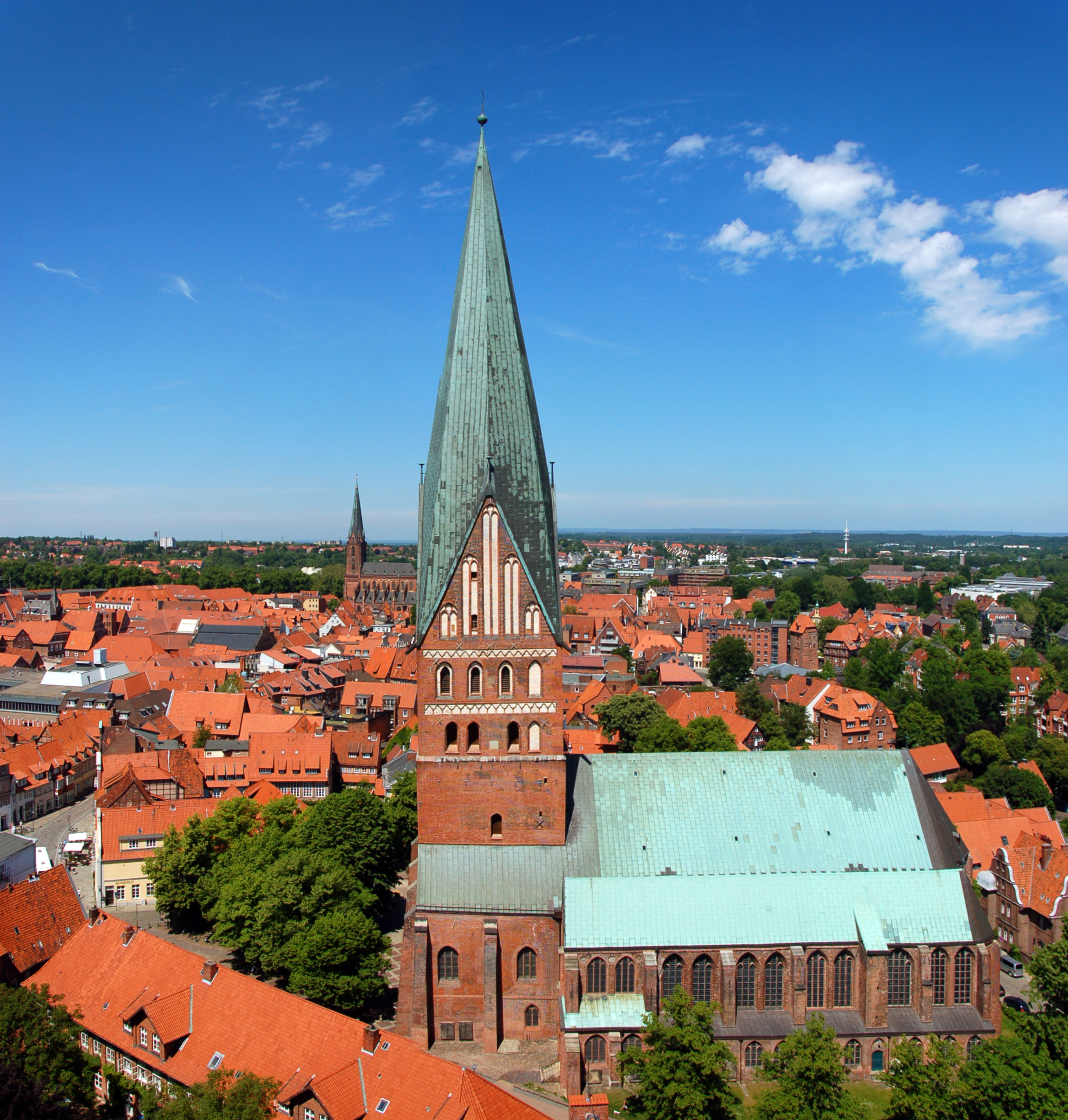 Lüneburg, Blick vom Wasserturm auf die St. Johanniskirche